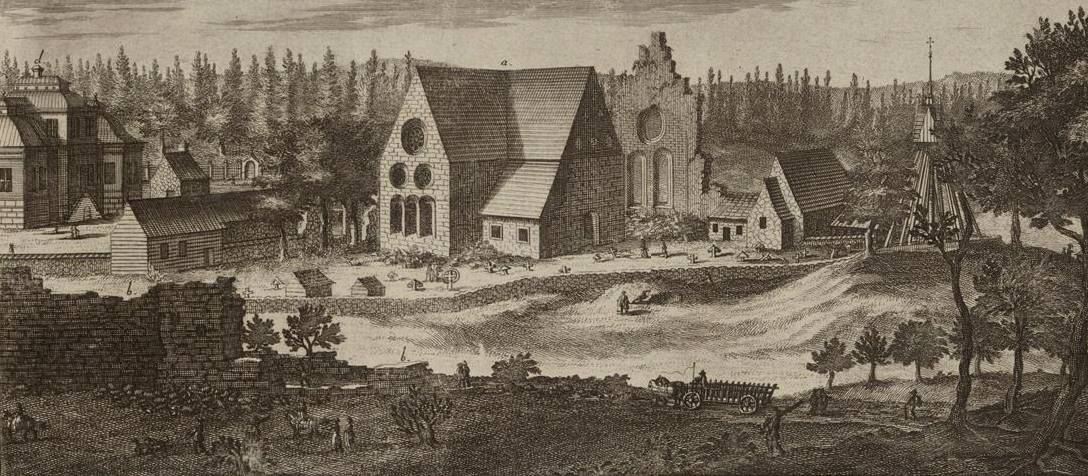 Ruiner av det fordom ståtliga Nydala kloster i Småland sådana de äro att se efter Kristian Tyranns mordbrand år 1520. Kopperstick av Erik Dahlbergh. Tryck 1708.